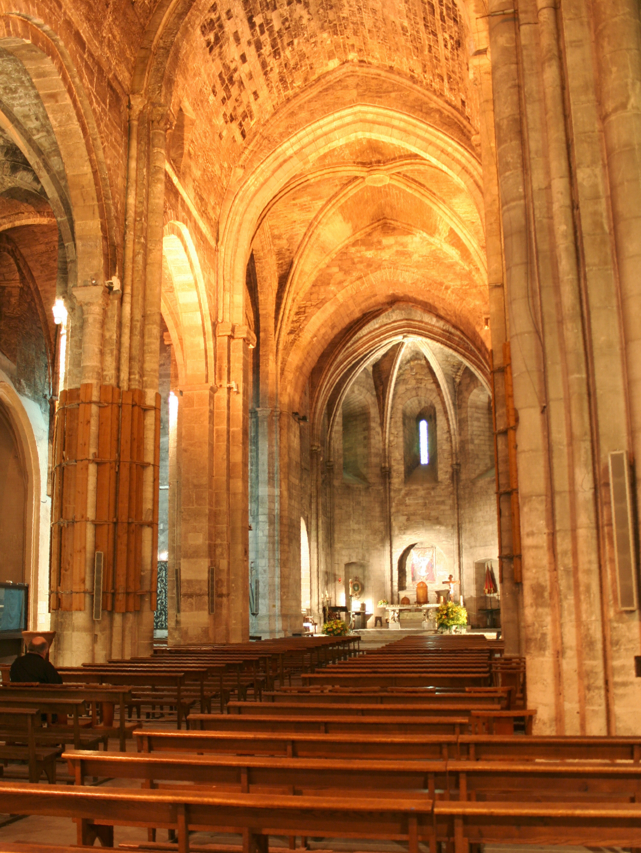 Nef de l'église de saint-Victor à Marseille.